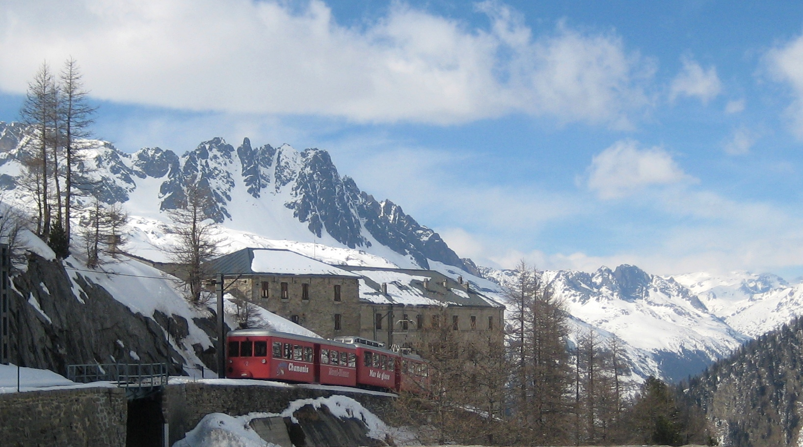 Train et hôtel du montenvers, Chamonix, France